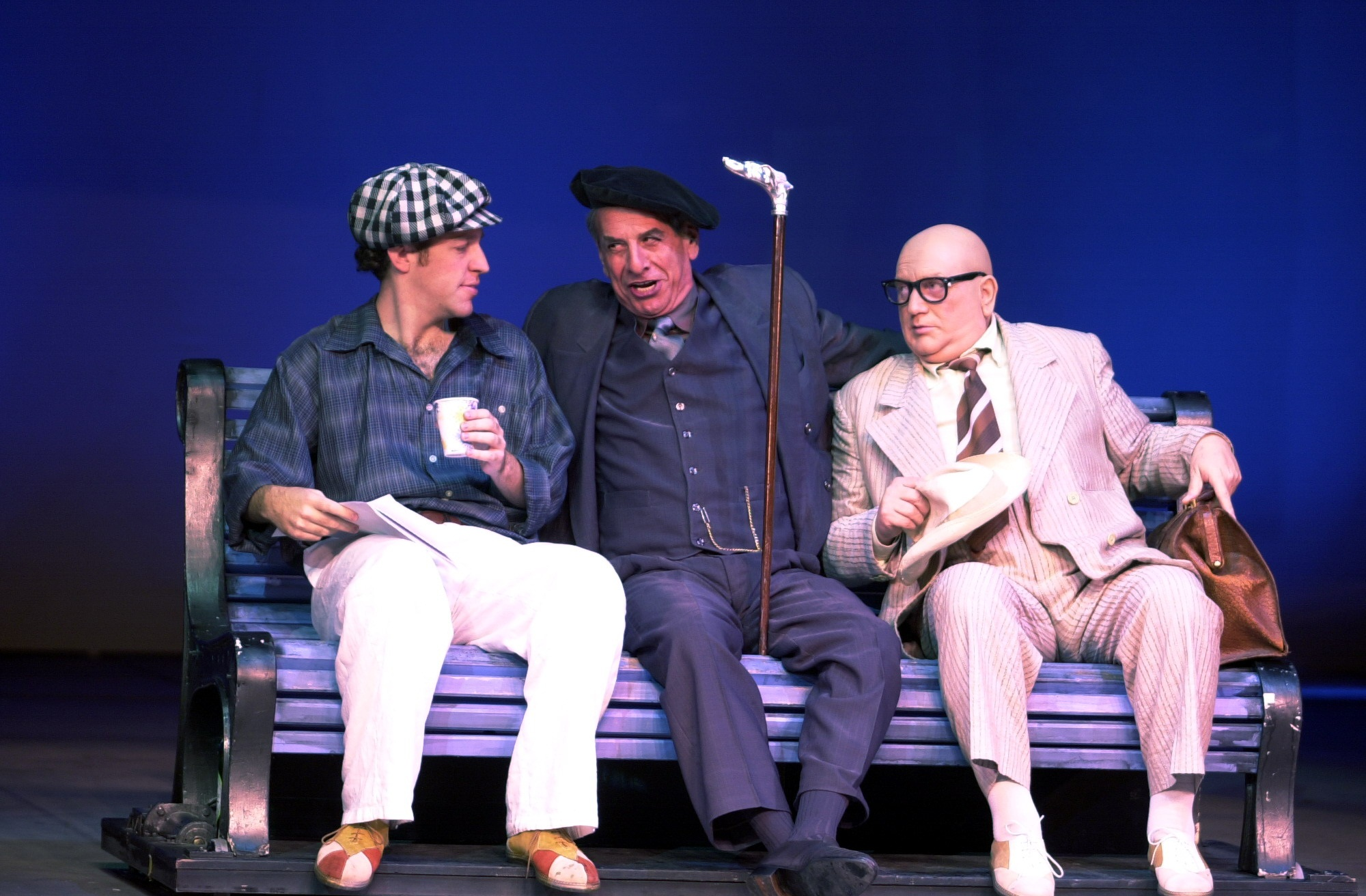 ההצגה השטן במוסקבה בתיאטרון גשר